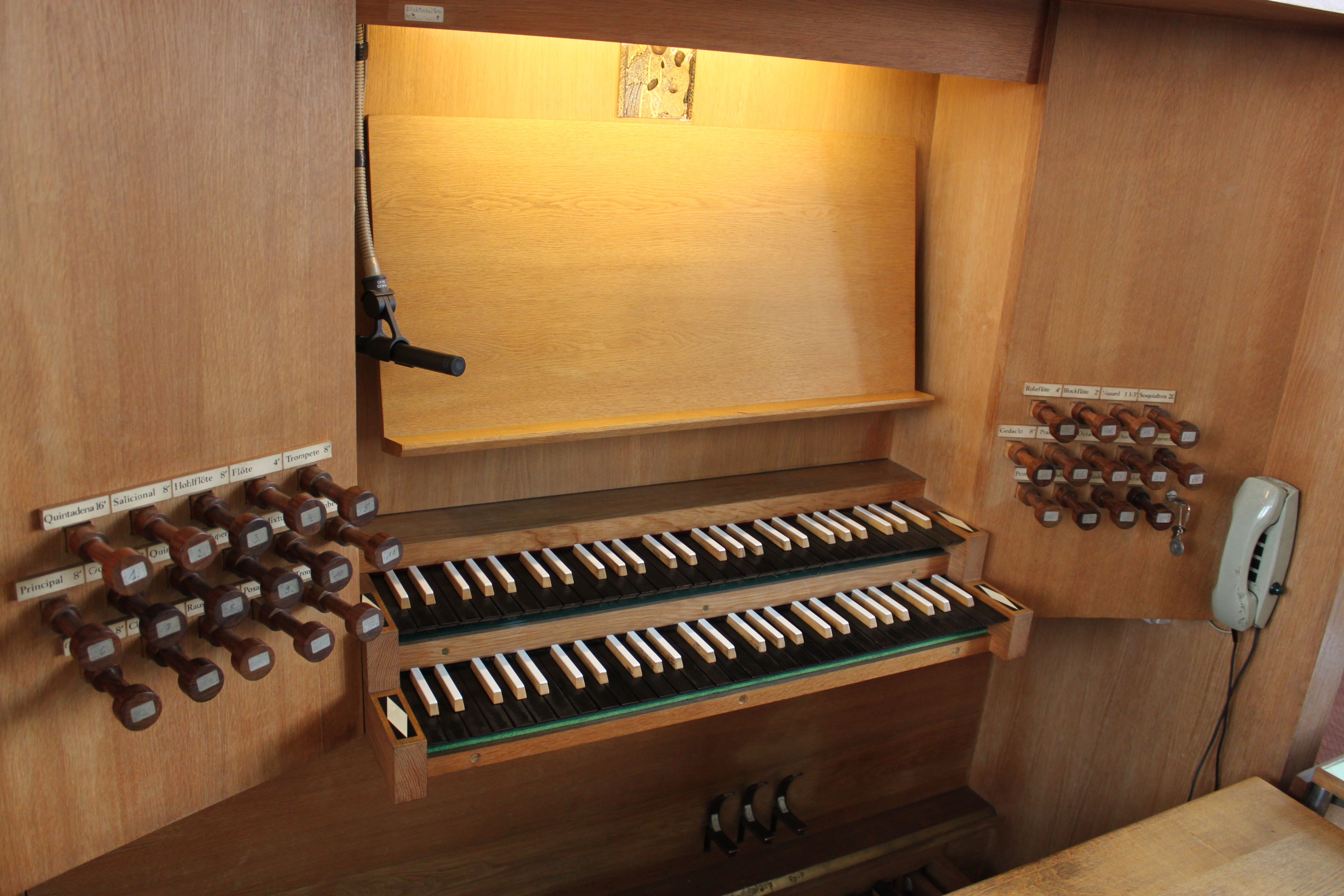 Prospekt der Orgel der Pfarrkirche Schmelz, Wien-Ottakring. Errichtet 1981 durch Herbert Gollini.